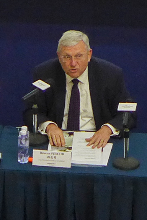 Duncan Warren Pescod